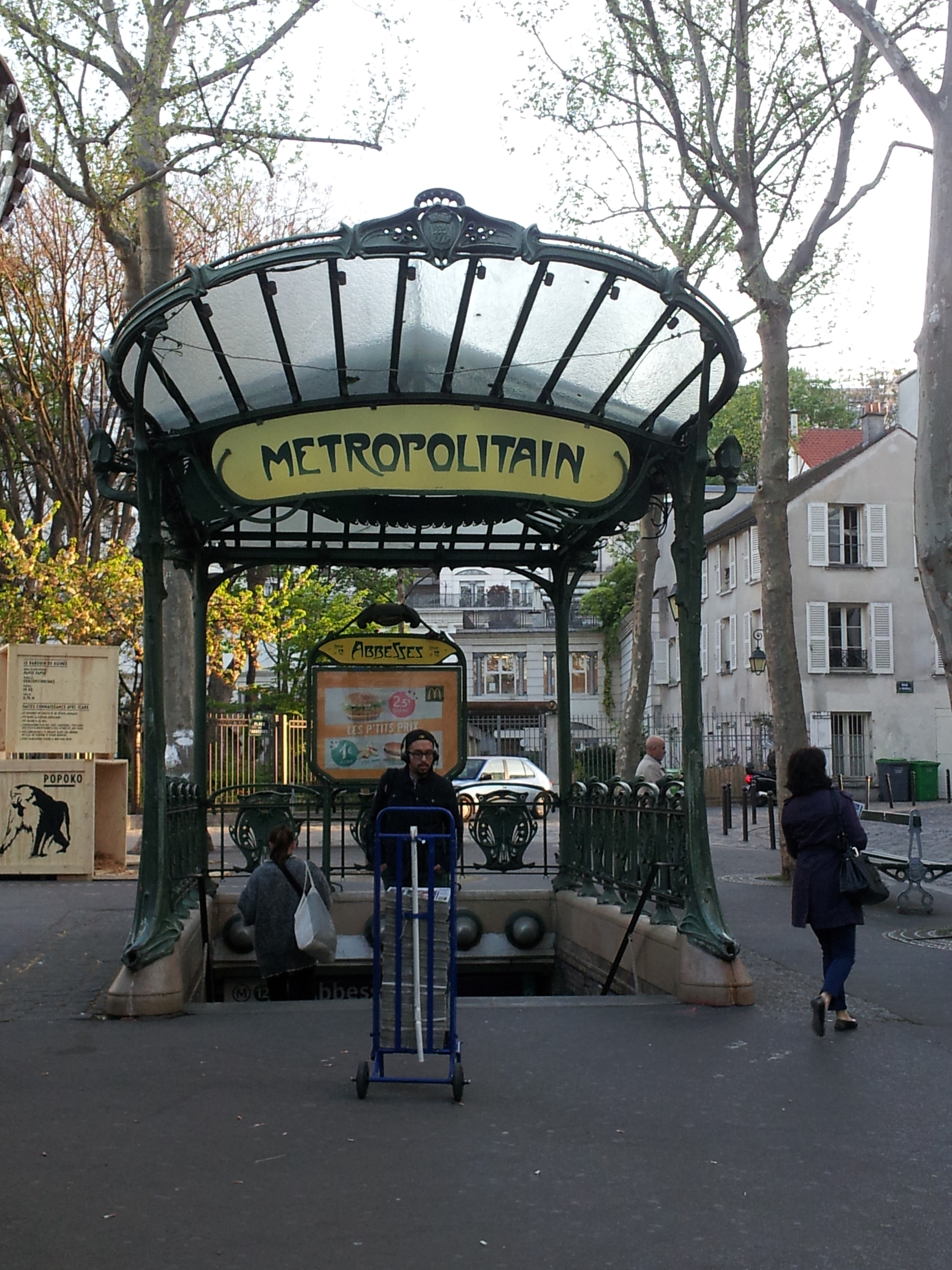 Abbesses (Paris Metro)